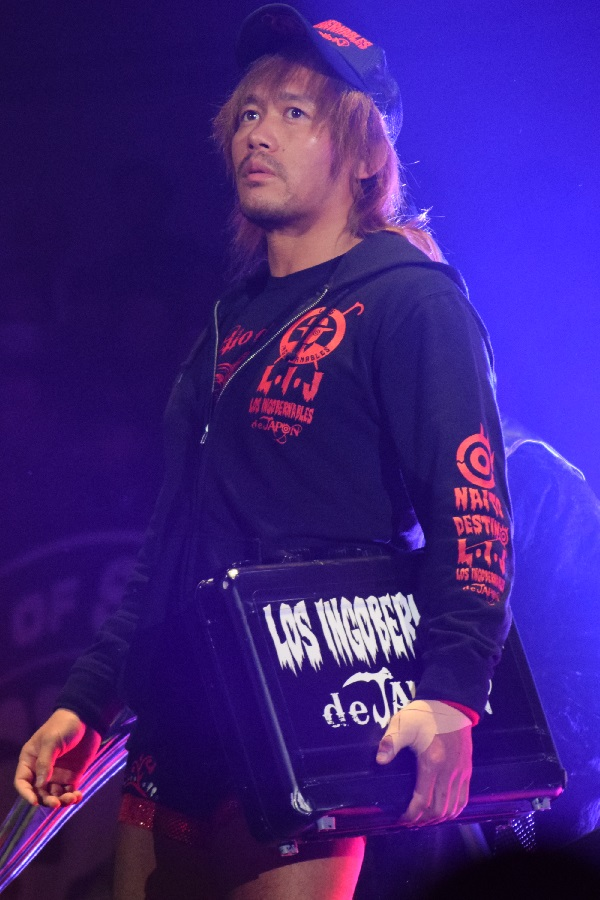 2017年11月5日 大阪府立体育会館「POWER STRUGGLE」 内藤哲也